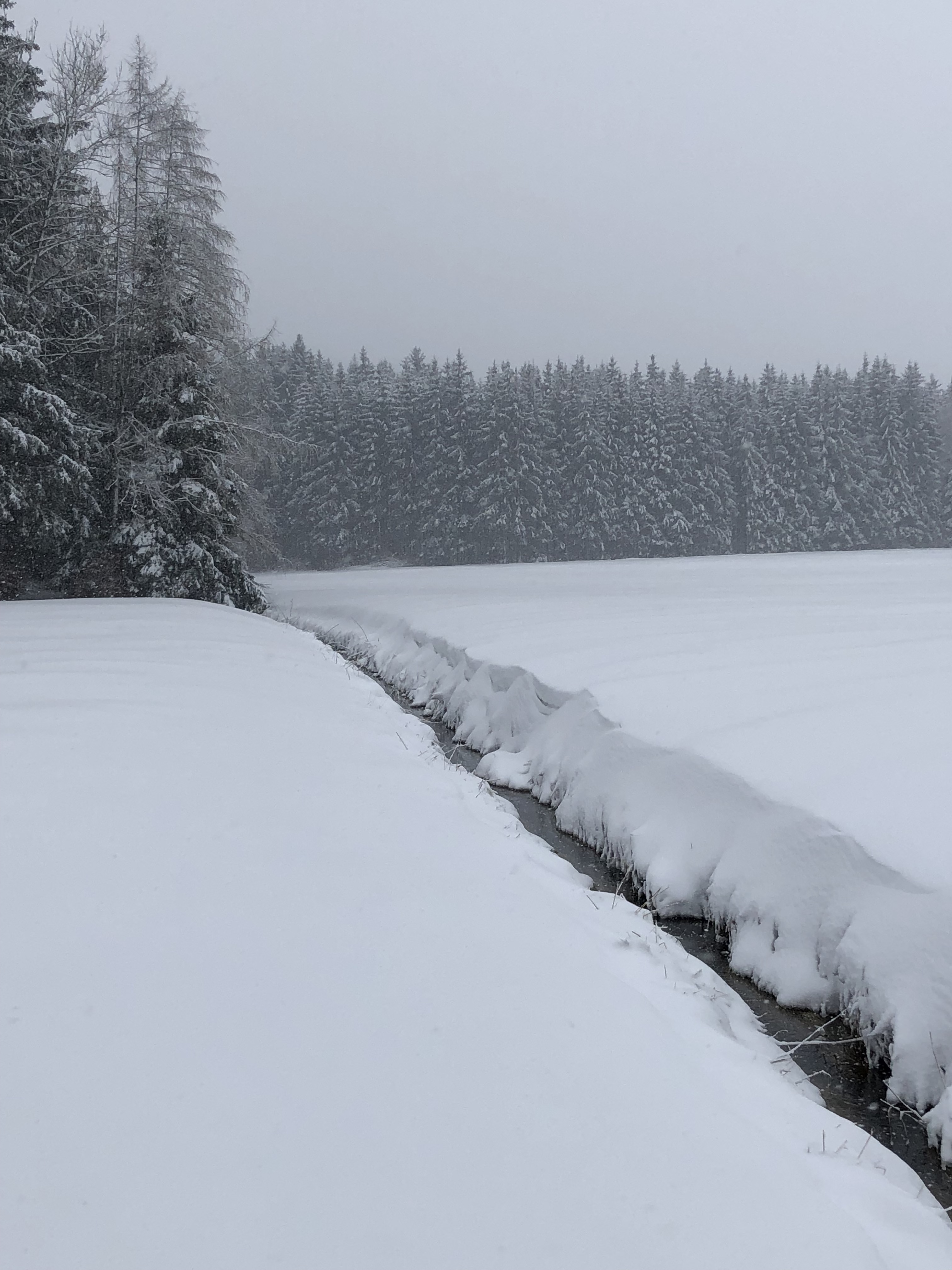 Beurerbach bei Dießen am Ammersee, Oberlauf am Unterbrucket, Markt Dießen am Ammersee, Landkreis Landsberg am Lech, Bayern, DE, Blick von Norden